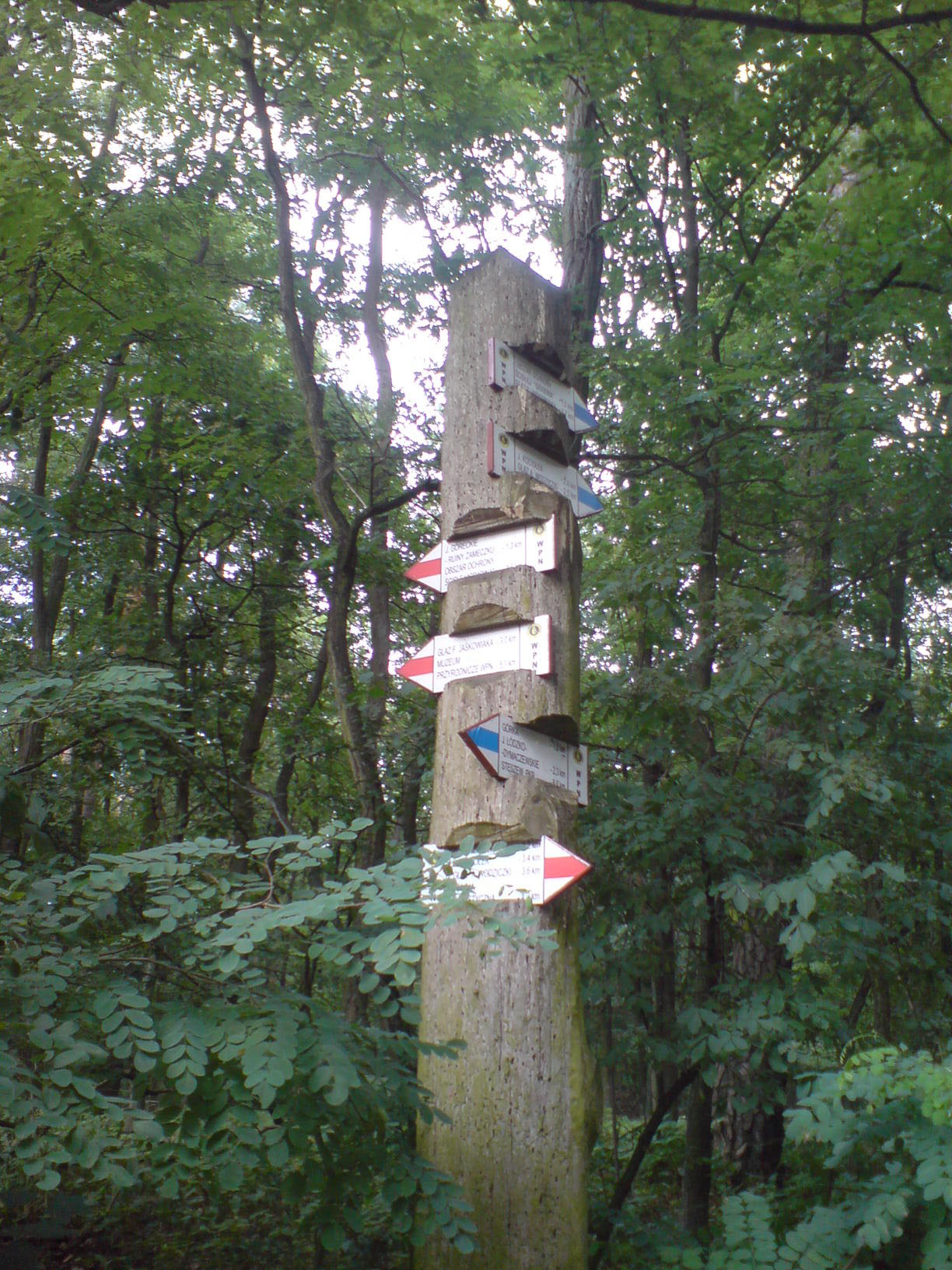 niebieski i czerwony szlak w wpn